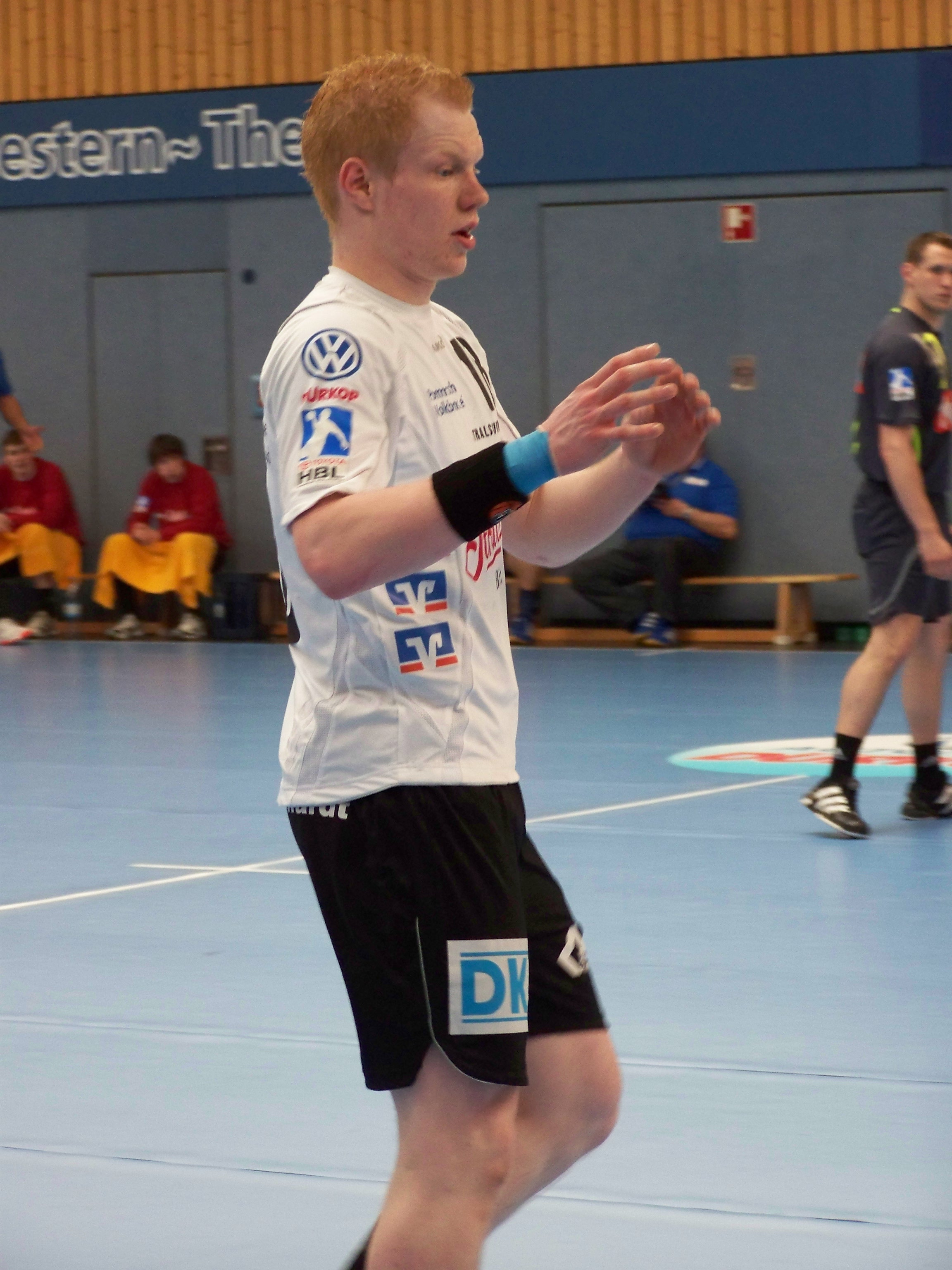 Der deutsche Handballspieler Christian Schwerin vom Stralsunder HV beim Bundesligaspiel gegen MT Melsungen am 4. April 2009.